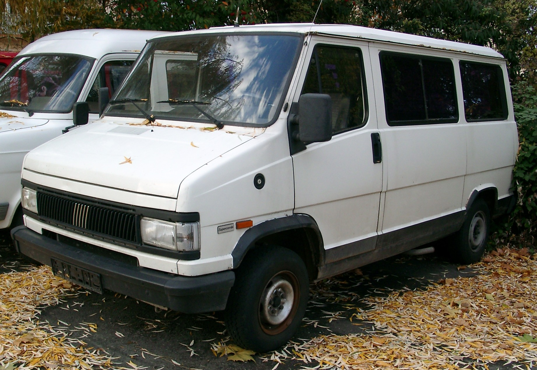 Fiat Ducato, 1. Generation